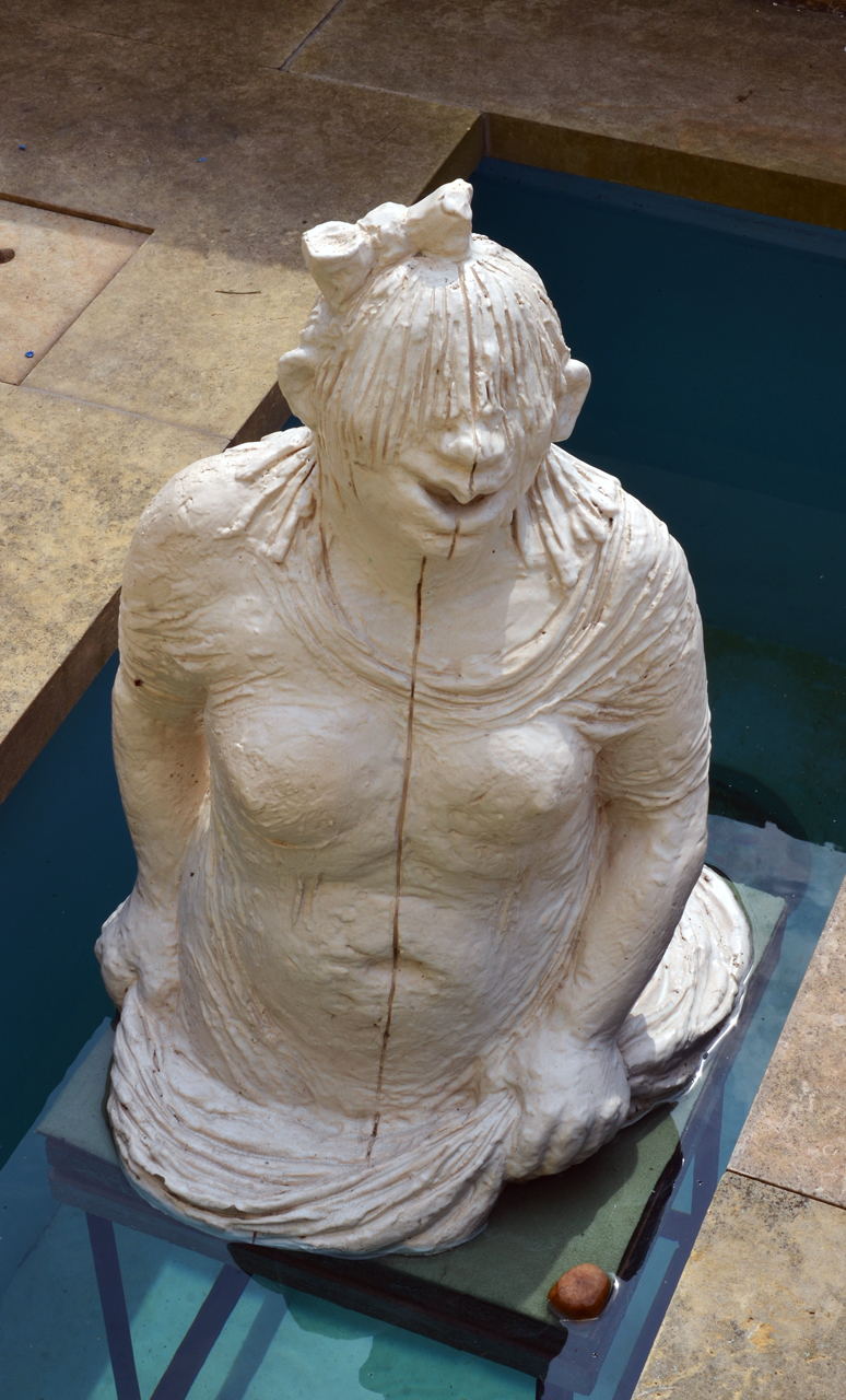 Bohumil Zemánek, Mokrá Julie (1974)